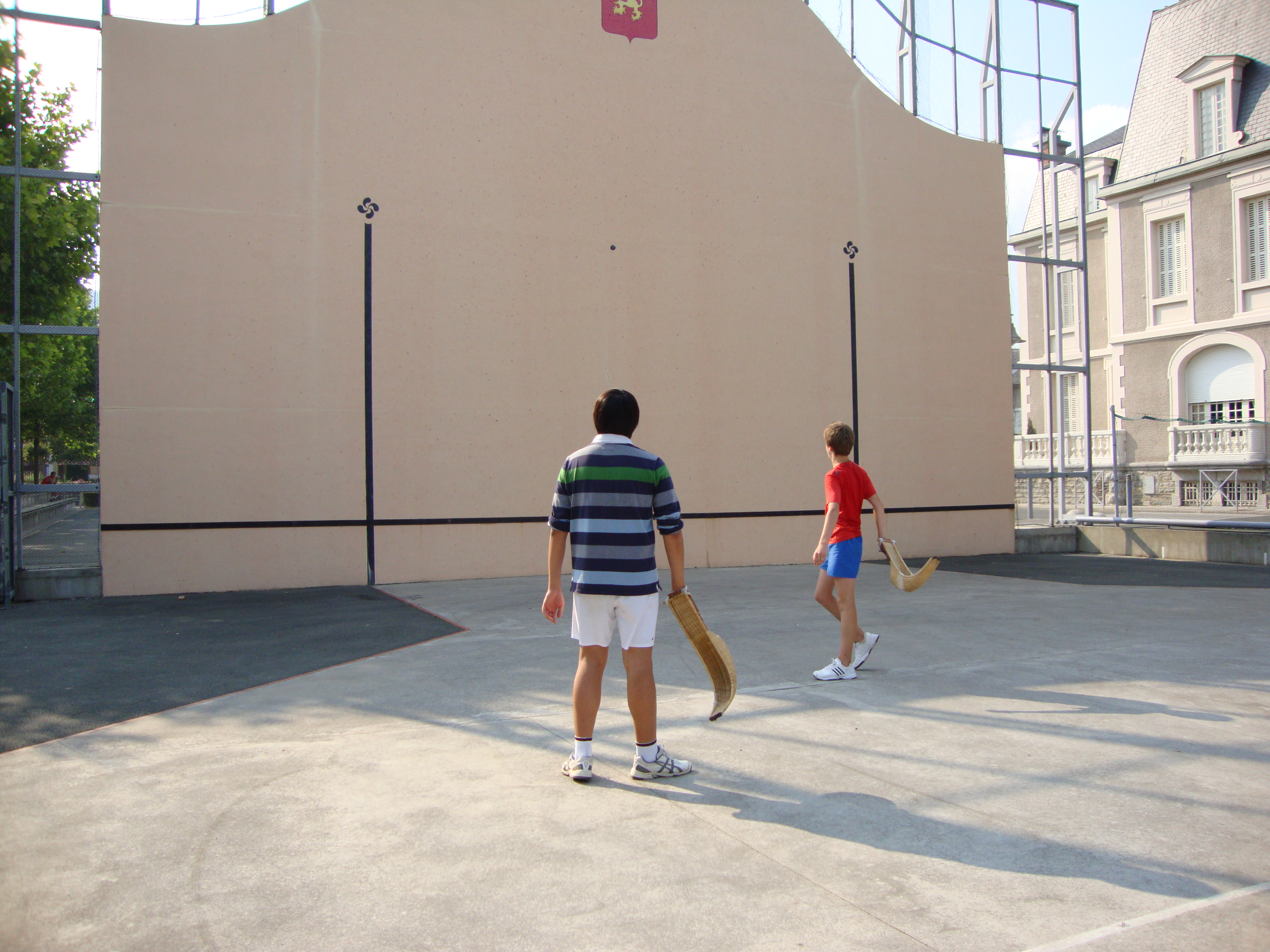 Mauleon (Pyr-Atl, Fr) Fronton, jeunes s'entrainant au chistera.